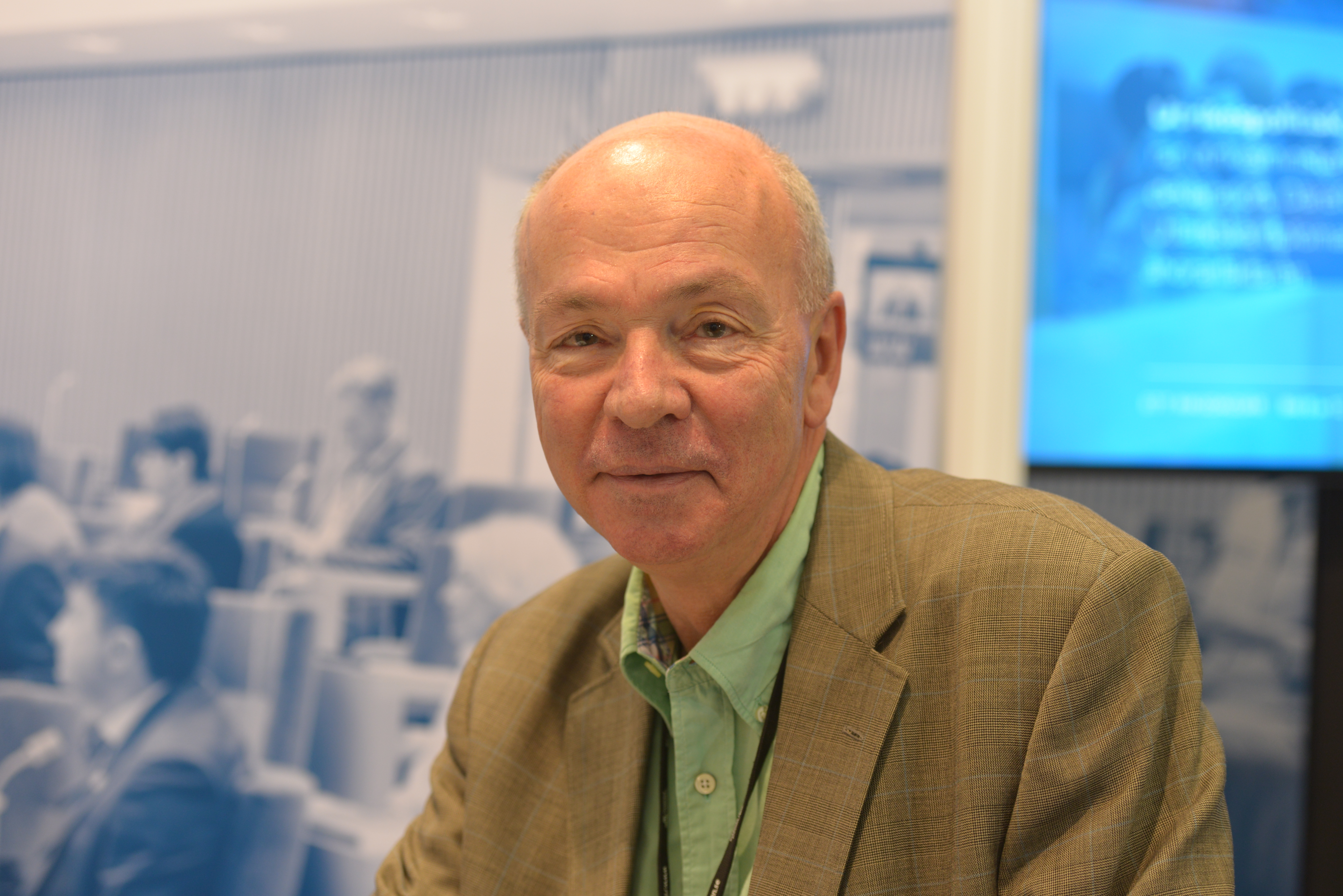 Dag Klackenberg (M) i Riksdagens monter på Bokmässan i Göteborg 2017.